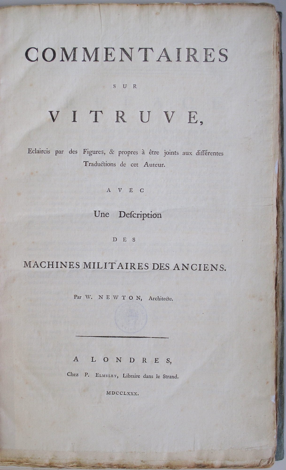 Titelblatt des Buches: Newton, William: "Commentaires sur Vitruve. Eclaircis par des figures, & propres à etre joints aux différentes traductions de cet auteur. Avec Une description des machines militaires des anciens. Par W. Newton, architecte. A Londres chez P. Elmsley, libraire dans le Strand. MDCCLXXX." Ein Rarum aus dem Bestand der Wissenschaftlichen Stadtbibliothek Mainz. Signatur: III i : 2° / 163 h